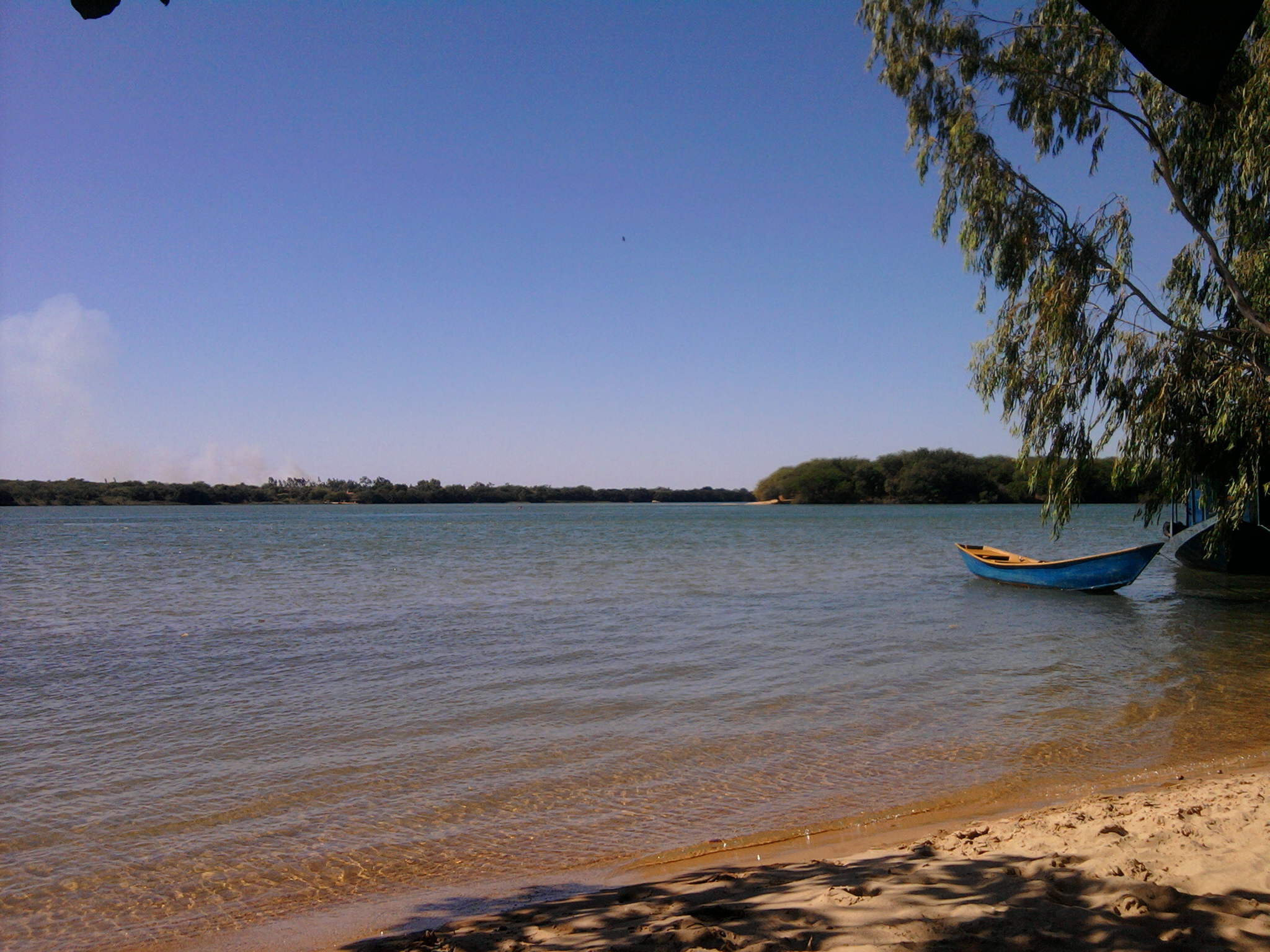 A Ilha do Rodeadouro fica próxima à cidade de Petrolina (PE), no Rio São Francisco, o "rio da integração nacional".